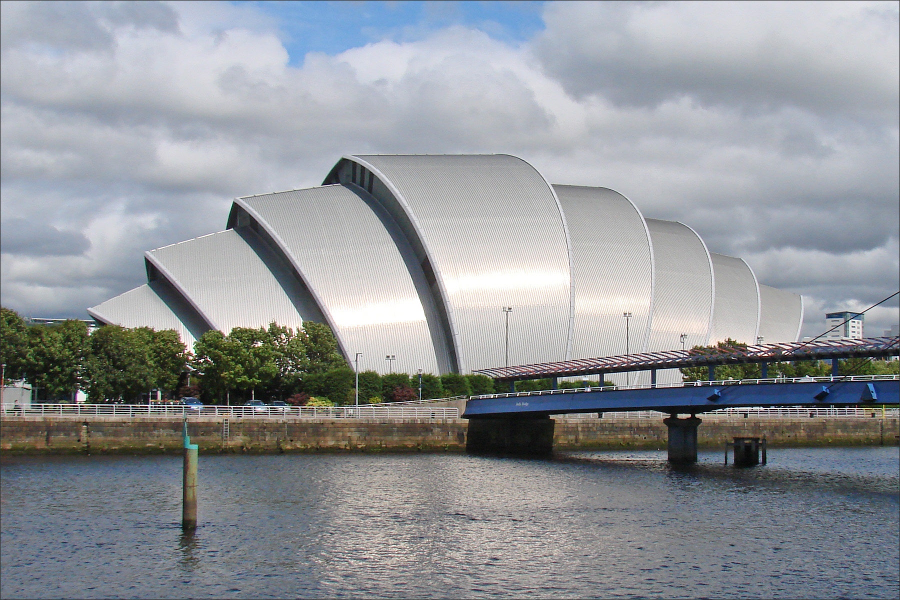 L'auditorium de la Clyde (Clyde Auditorium) a été conçu par le cabinet d'architecture "Foster and partners". Il accueille des spectacles, des congrès et de nombreuses manifestations. Il est voisin du palais des expositions : the Scottish Exhibition Conference Centre (SECC)